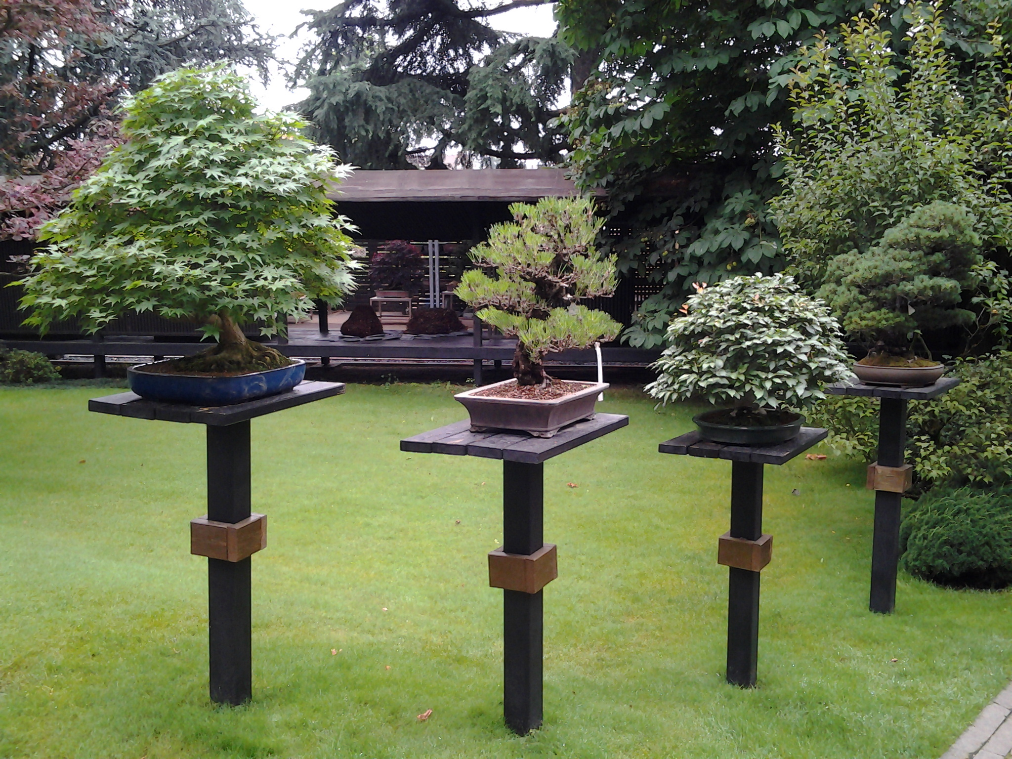 Museo del bonsai "Crespi" This is a photo of a monument which is part of cultural heritage of Italy.